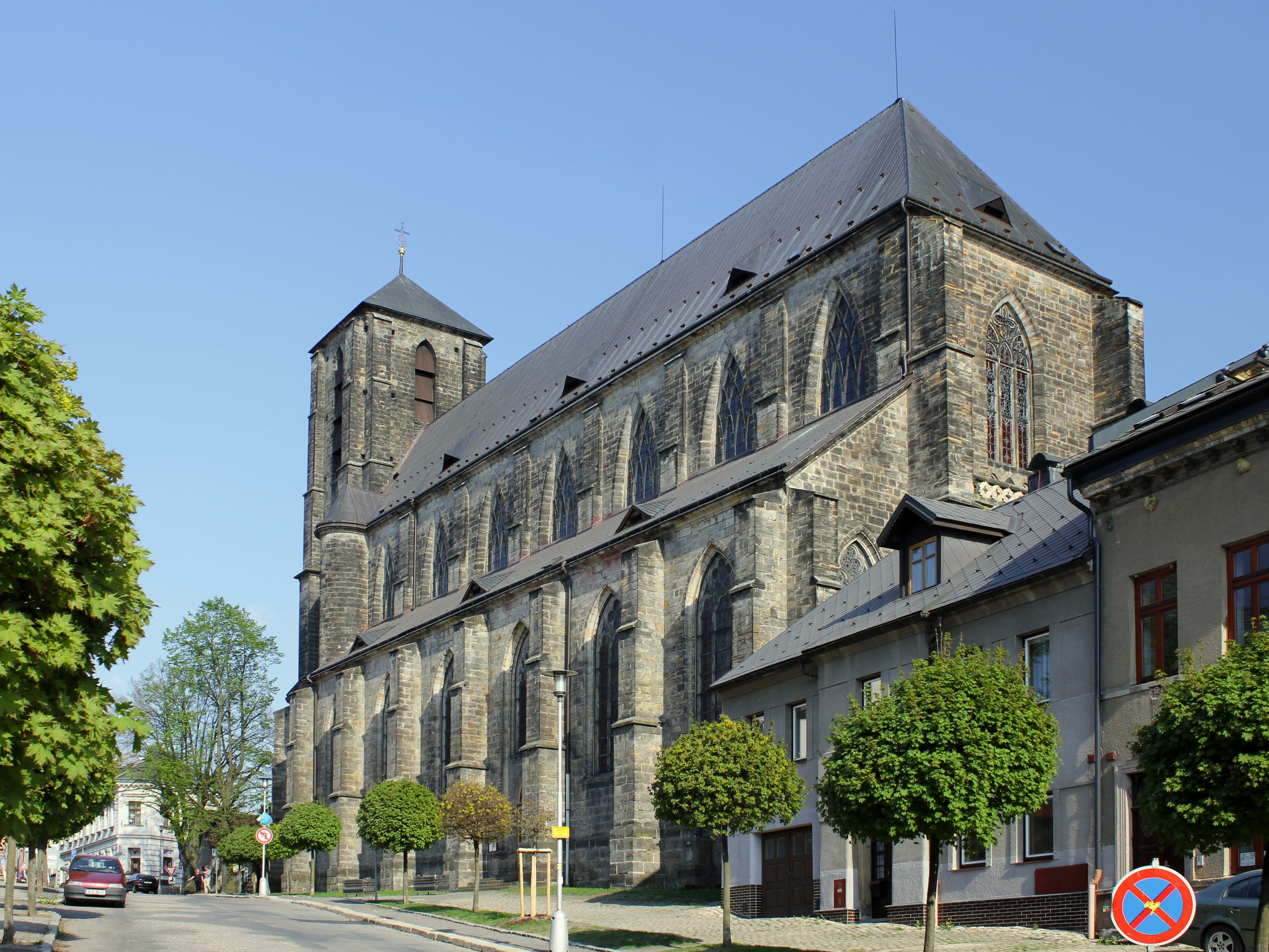 Chrám Narození Panny Marie